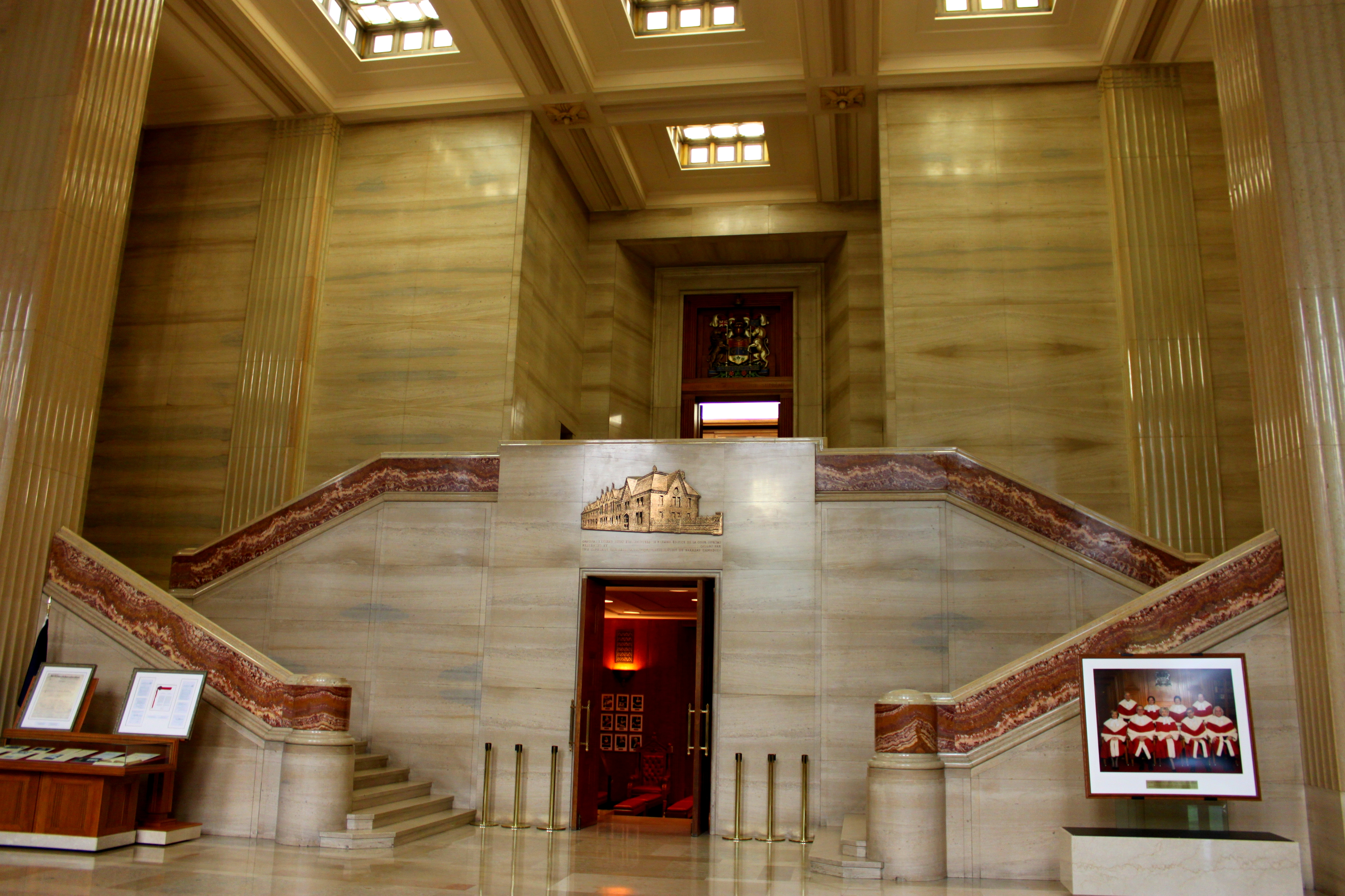 Der Oberste Gerichtshof von Kanada in Ontario am 30. Juli 2011 ca. um die Mittagszeit